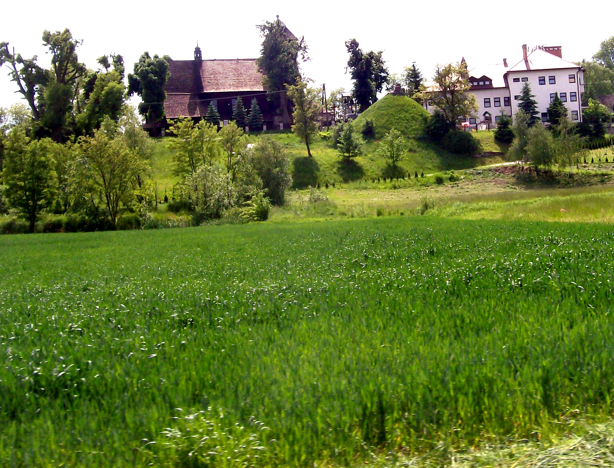 Nowosielce (powiat przeworski) na prawo od kościoła św. Marii Magdaleny widoczny kopiec ziemny usypany ku czci Michała Pyrza